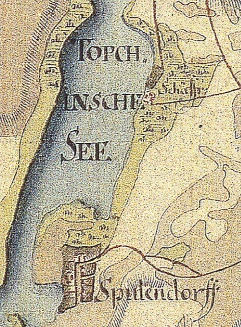 Waldeck (früher Sputendorf, Sputenberge), Gemeindeteil von Töpchin, Ortsteil der Stadt Mittenwalde, Lkr. Dahme-Spreewald, Brandenburg, Ausschnitt aus dem Schmettauschen Kartenwerk von 1767/87